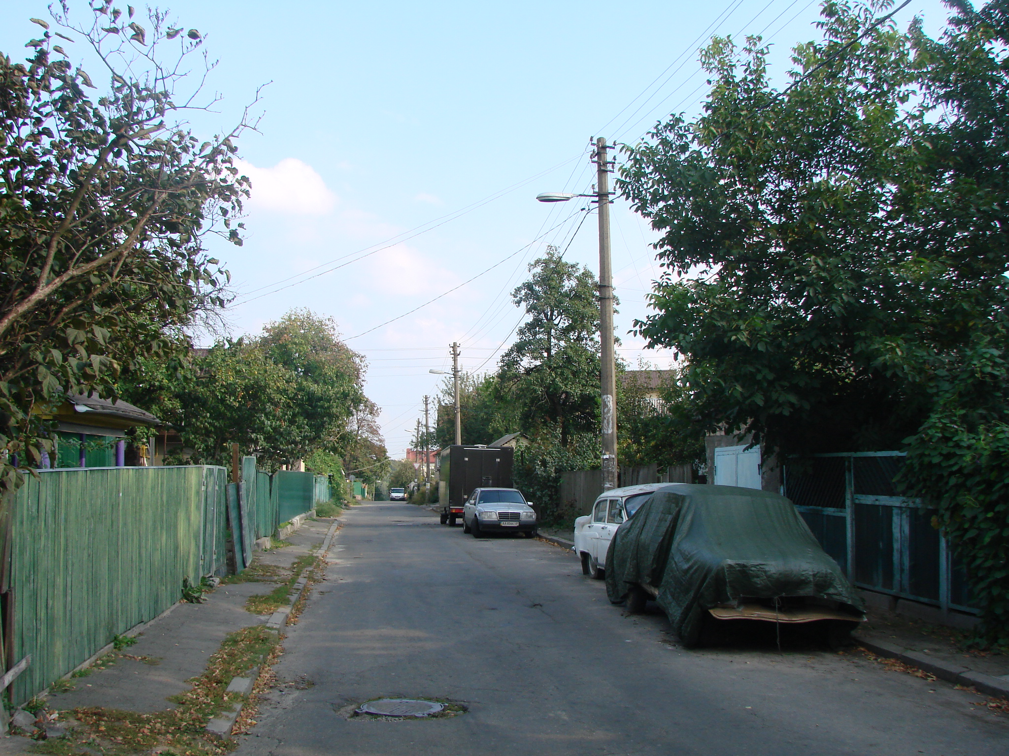 Оборонна вулиця у Києві